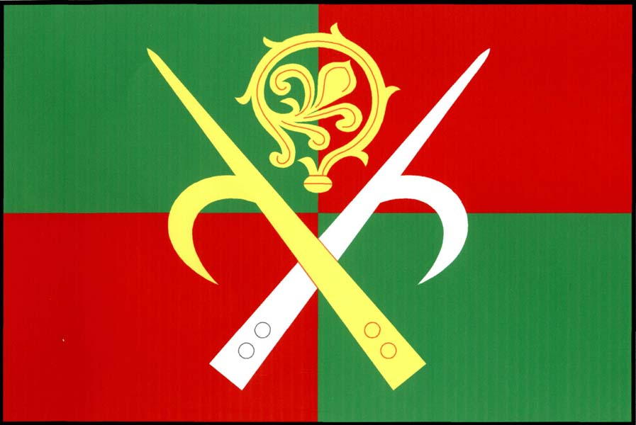 Vlajka obce Malá Roudka